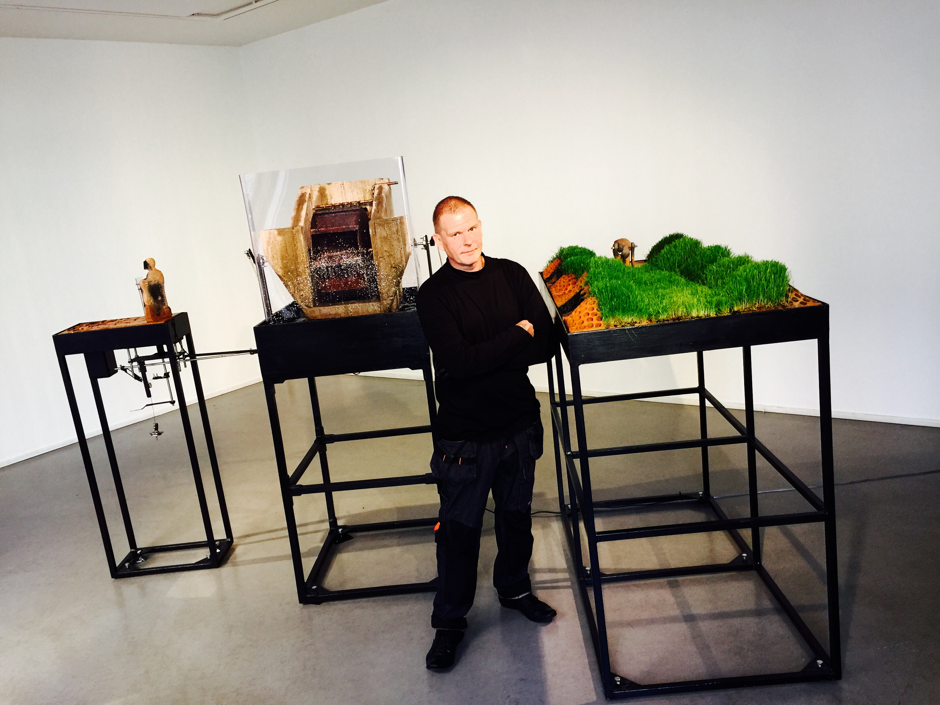 Markus Copper & veistos Scania Clockwork 2016